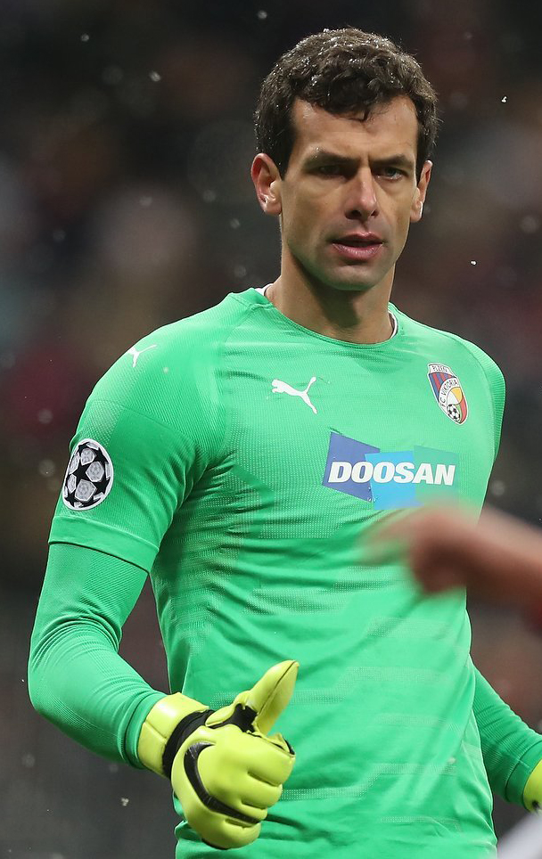 ЦСКА терпит болезненное поражение от «Виктории» и лишается шансов на выход в плей-офф ЛЧ